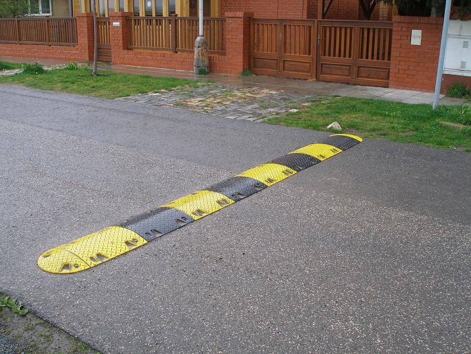 Úzký příčný práh v Praze - Kbelích.